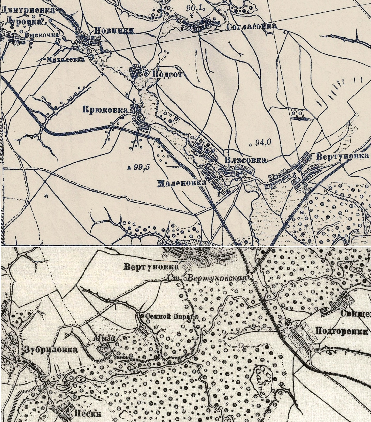 Военно-Топографическая карта Российской Империи Ф. Ф. Шуберта, 3 версты в 1 дюйме, съема 1846—1863 годов, Литография Картографического Отдела, 1919, ряд XVI, лист 21, ряд XVII, лист 21 фрагмент: Сосновка (на карте Вертуновка), Вертуновка Сердобского уезда.